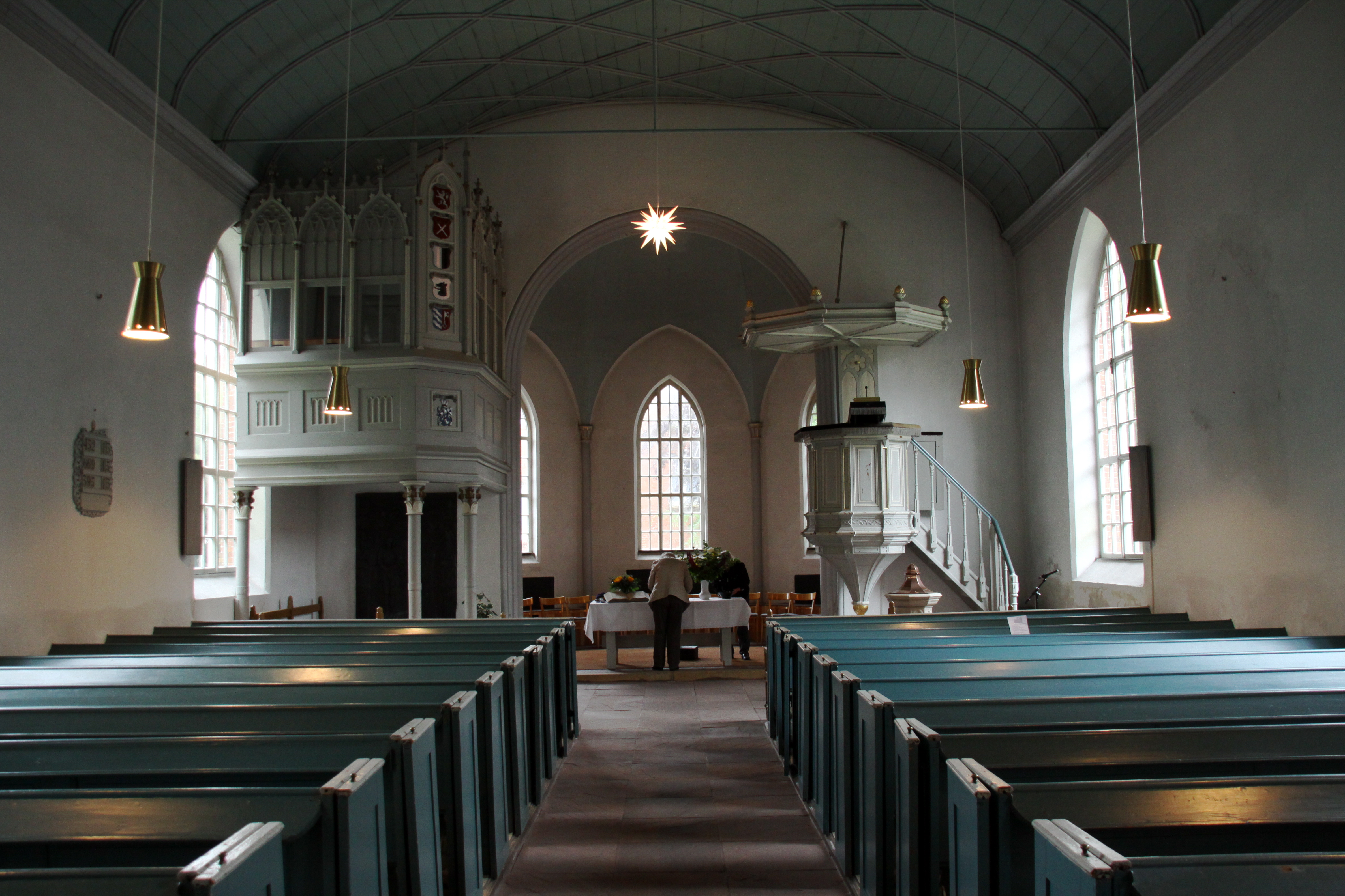 Innenraum der Kirche von Loppersum (Hinte)